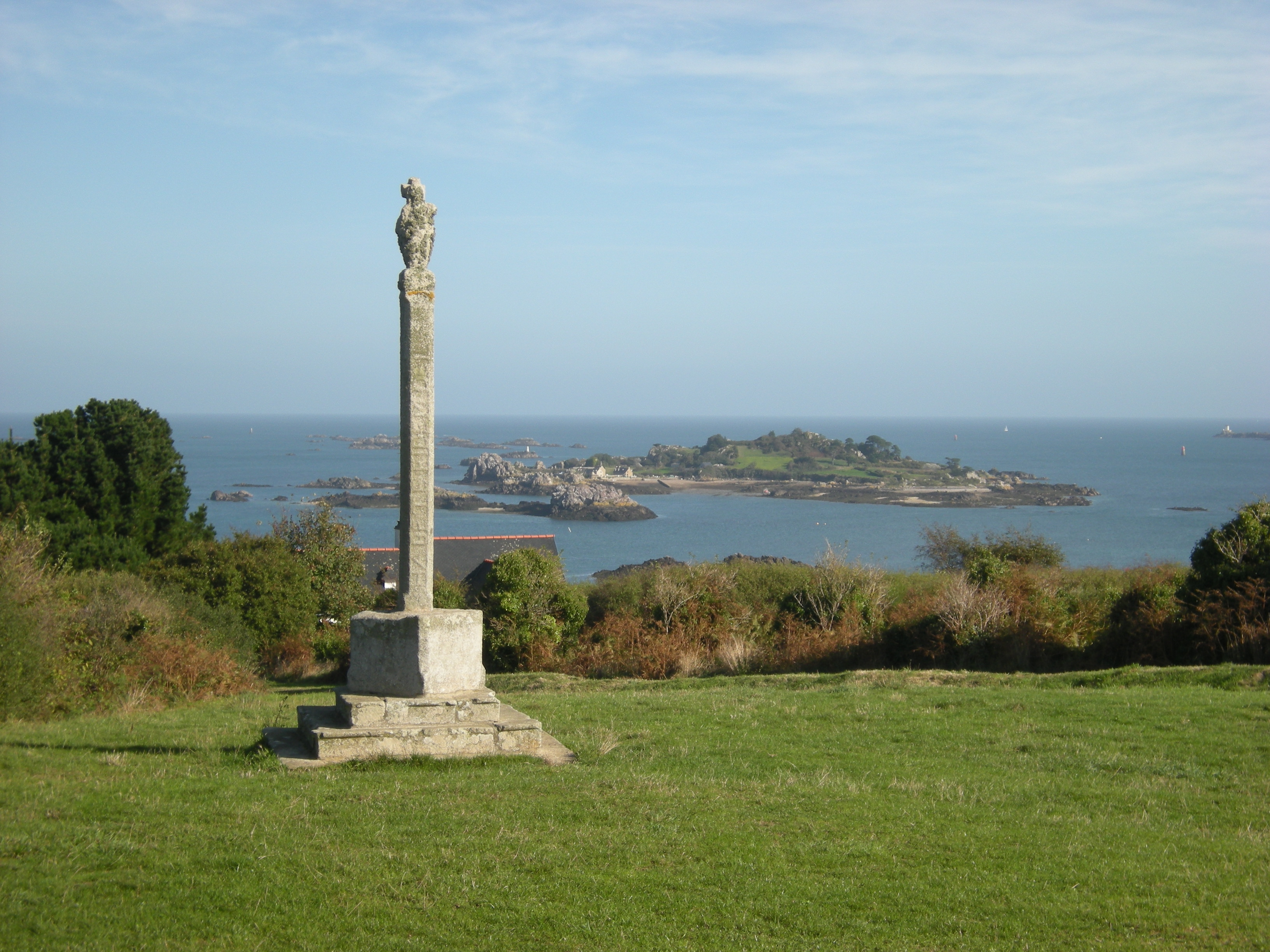 Vues de Ploubazlanec depuis Pors-Even et depuis la Croix des veuves : Pors-Even, île Saint-Riom et baie de Launay La Croix des veuves, pointe de la Trinité. Vue de l' île Saint-Riom au second plan